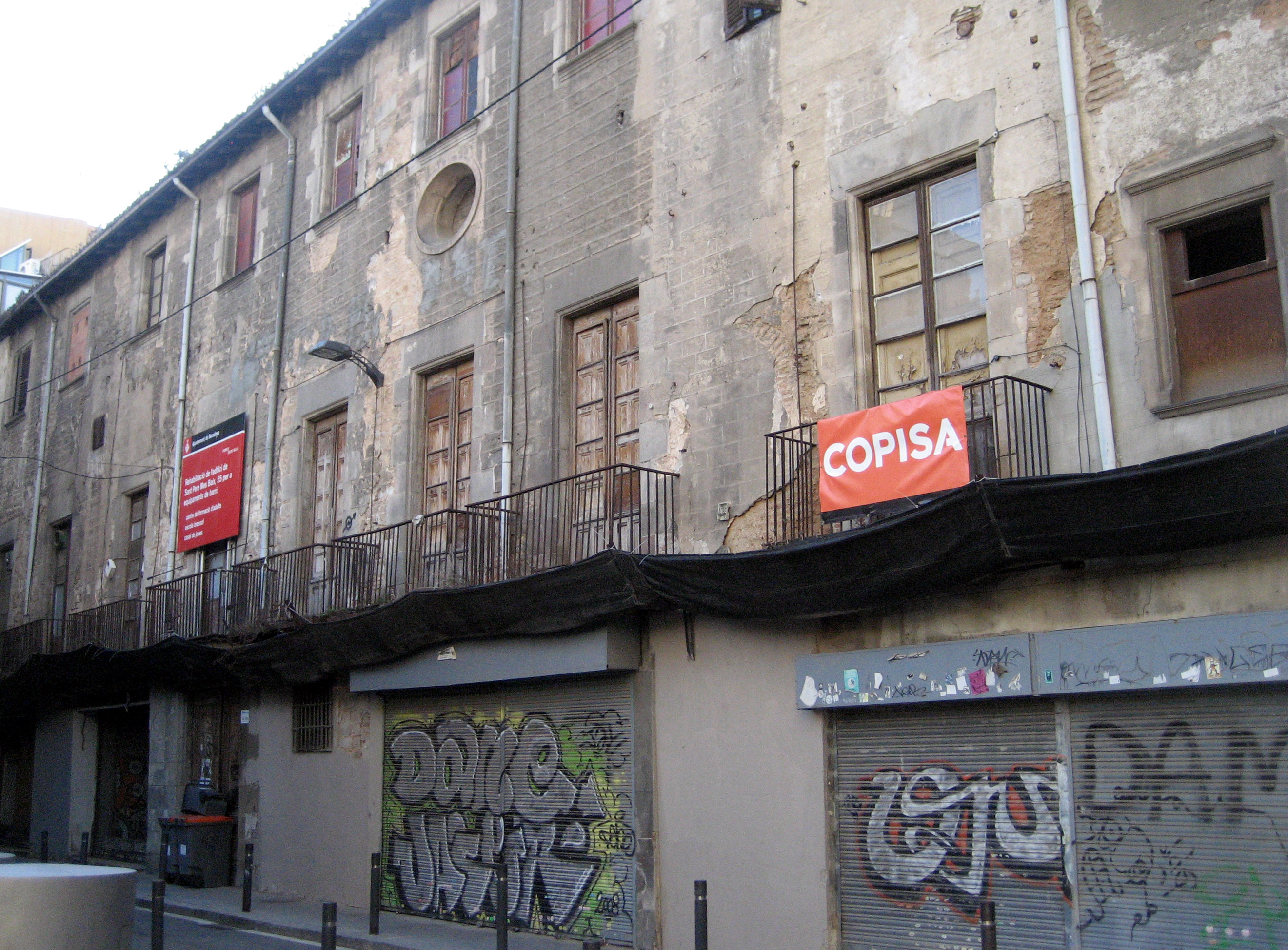 Façana de la Penya Cultural Barcelonesa. Carrer de Sant Pere Més Baix, 55